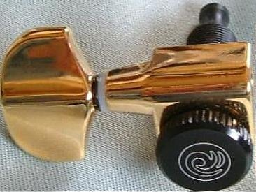 吉他弦鈕